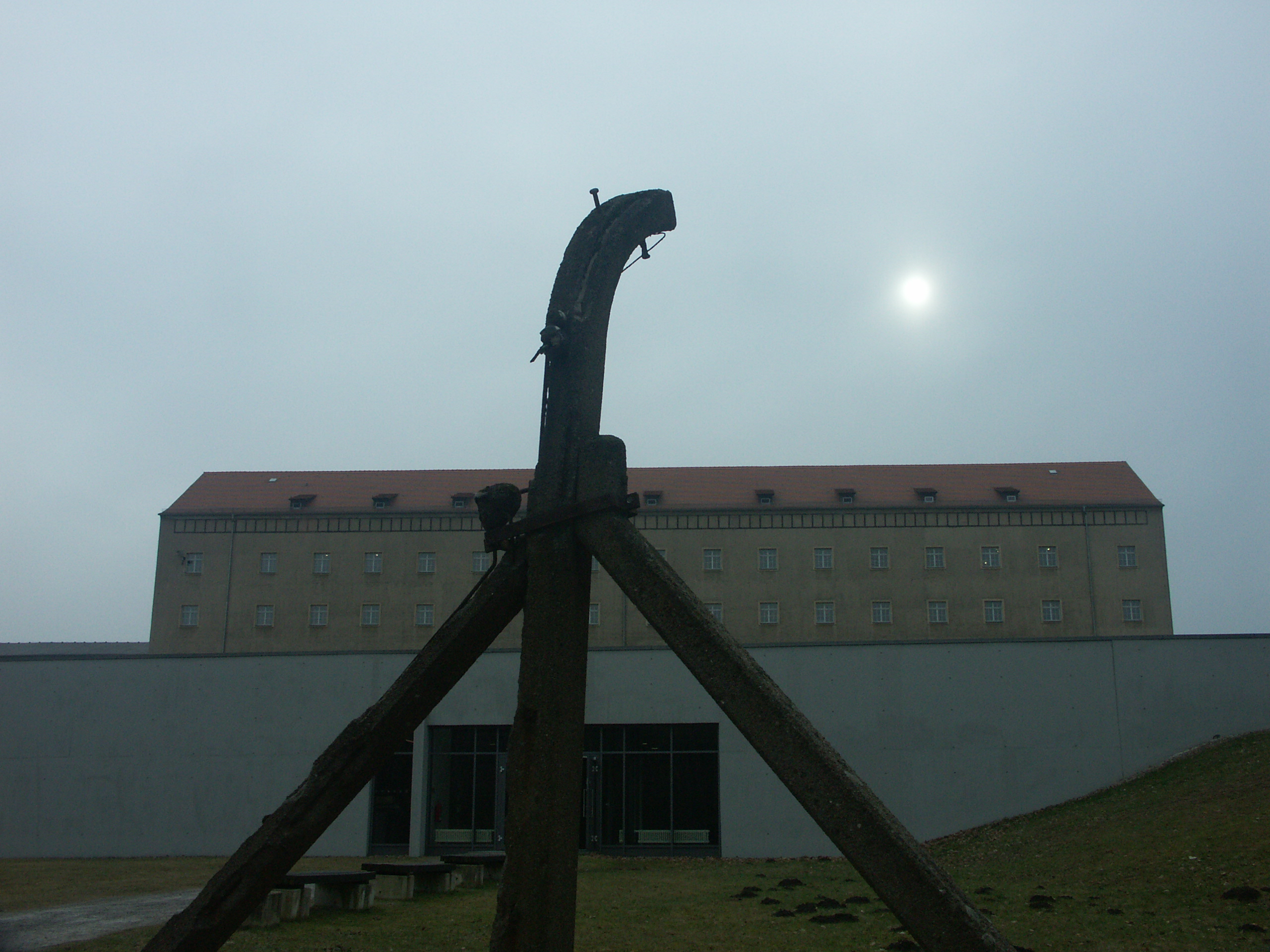 Effektenkammer - im Vordergrund die Ausstellung zum Speziallager II